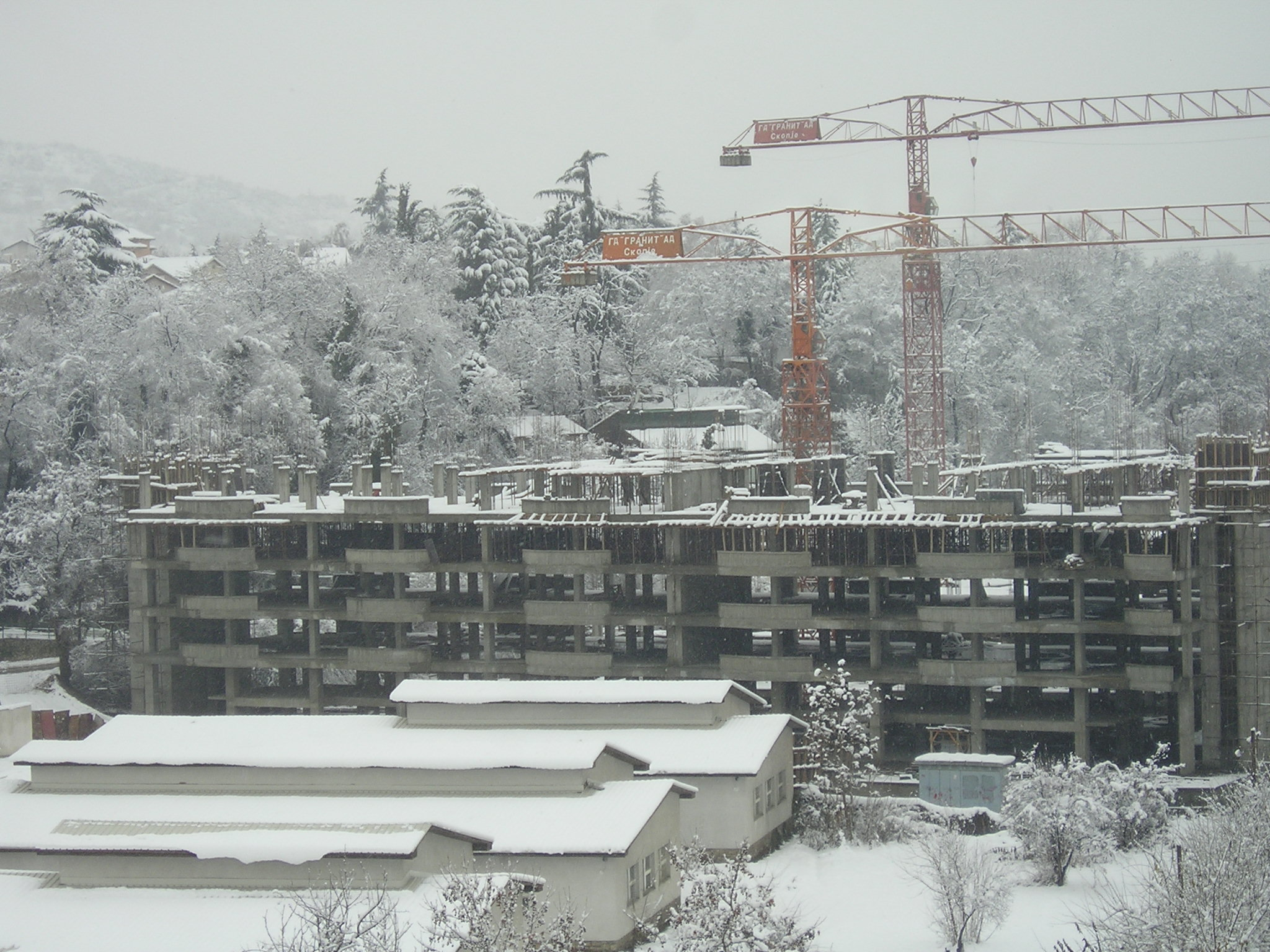 Зградите кои се градат на местото на КТК (преку зима)